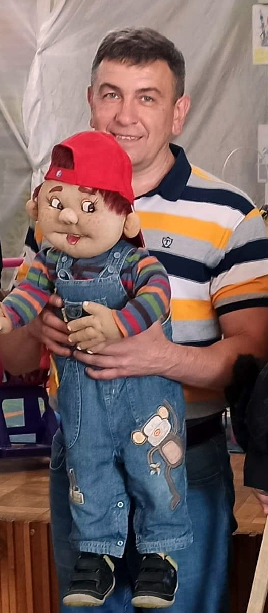 Віктор Сердюк, 2020 рік. Полтавська обласна бібліотека для дітей ім. Панаса Мирного